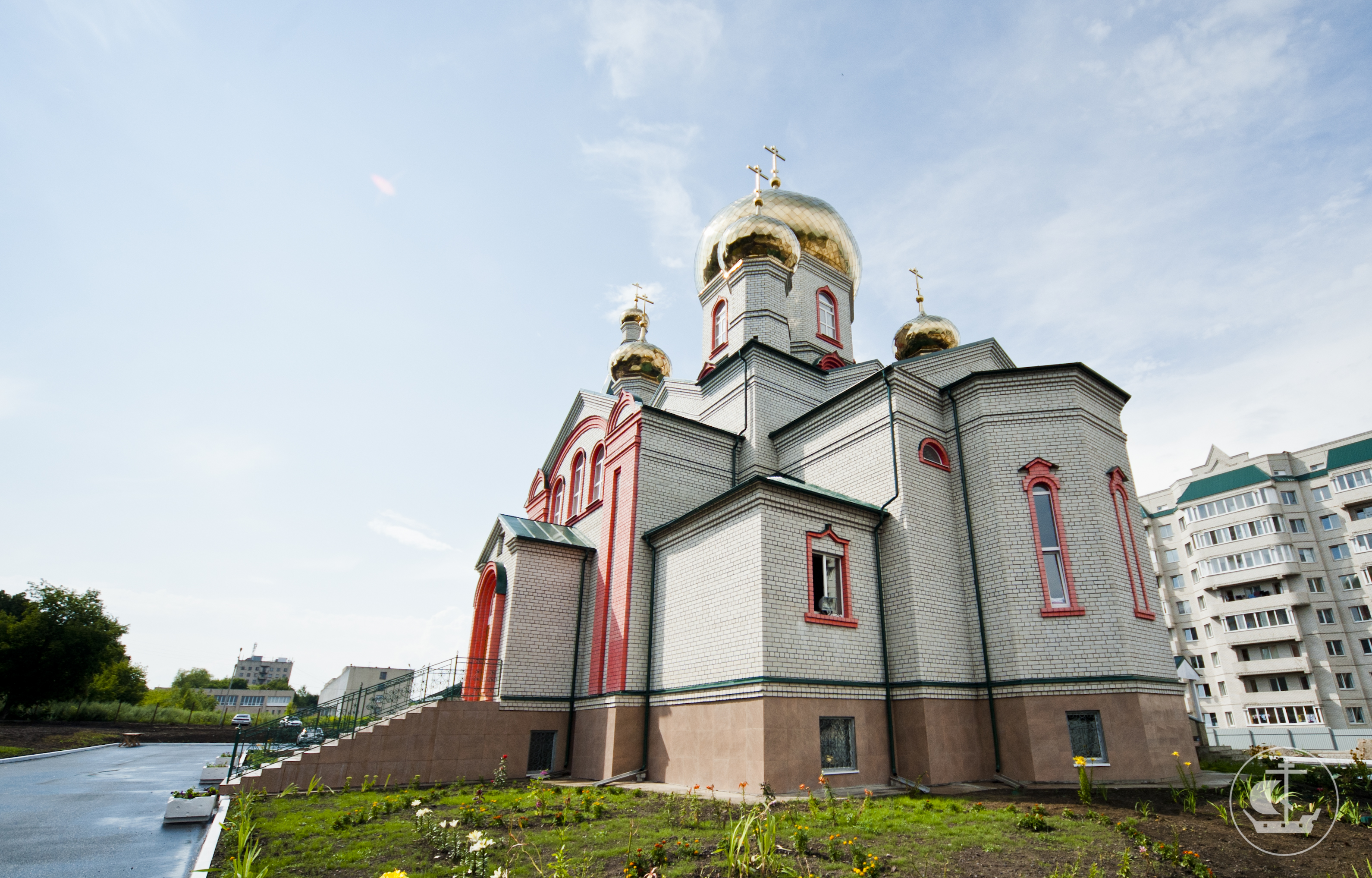 14 июля 2013, Освящение Троицкого кафедрального собора г. Железногорска